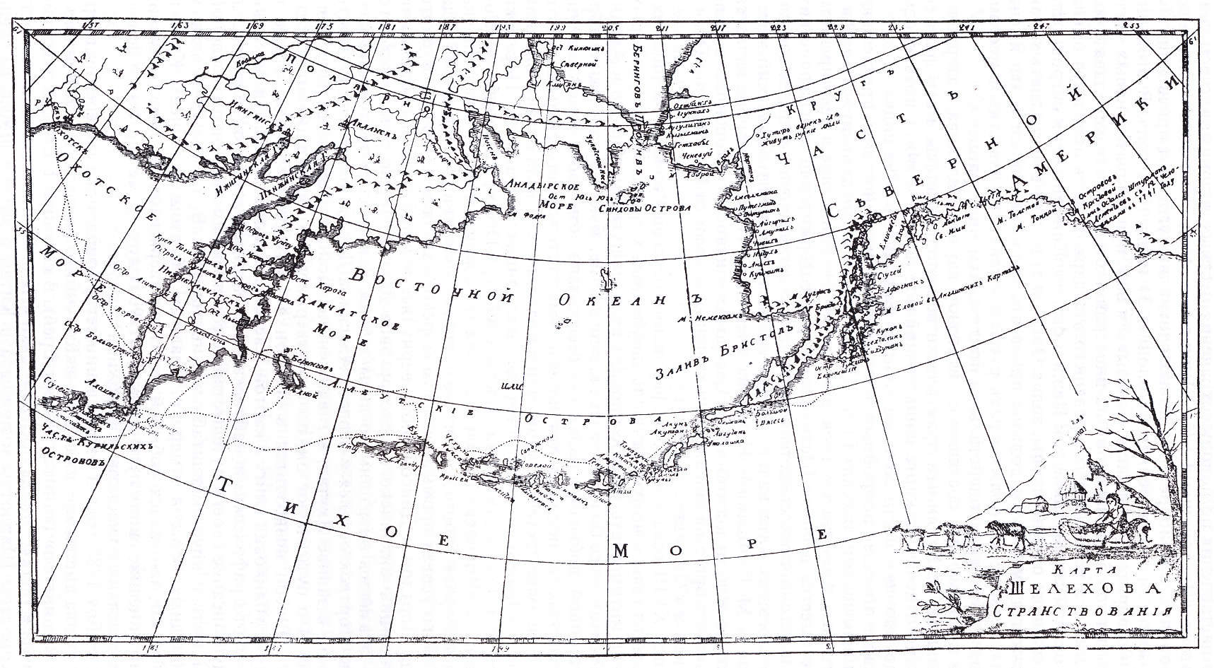 Карте Шелехова странствования, 1791